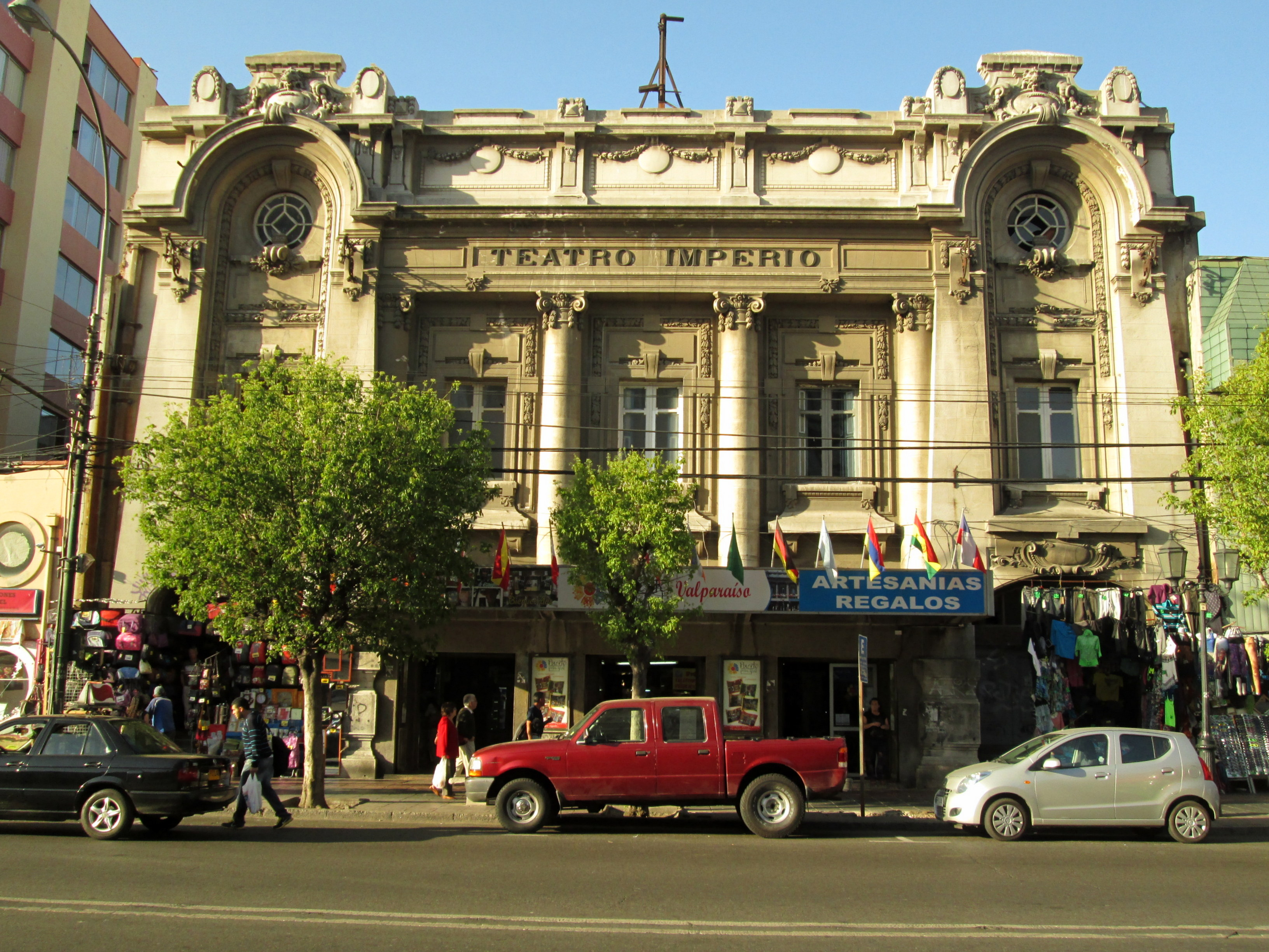 Fachada del ex teatro Imperio, ahora convertido en feria artesanal.